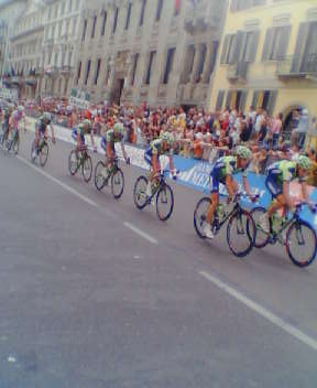 Milano: Foto che riprende ancora gli uomini della Liquigas che guidano il gruppo al sesto passaggio su Corso Venezia.